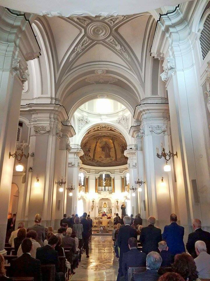 Interno Chiesa di San Pasquale a Chiaia